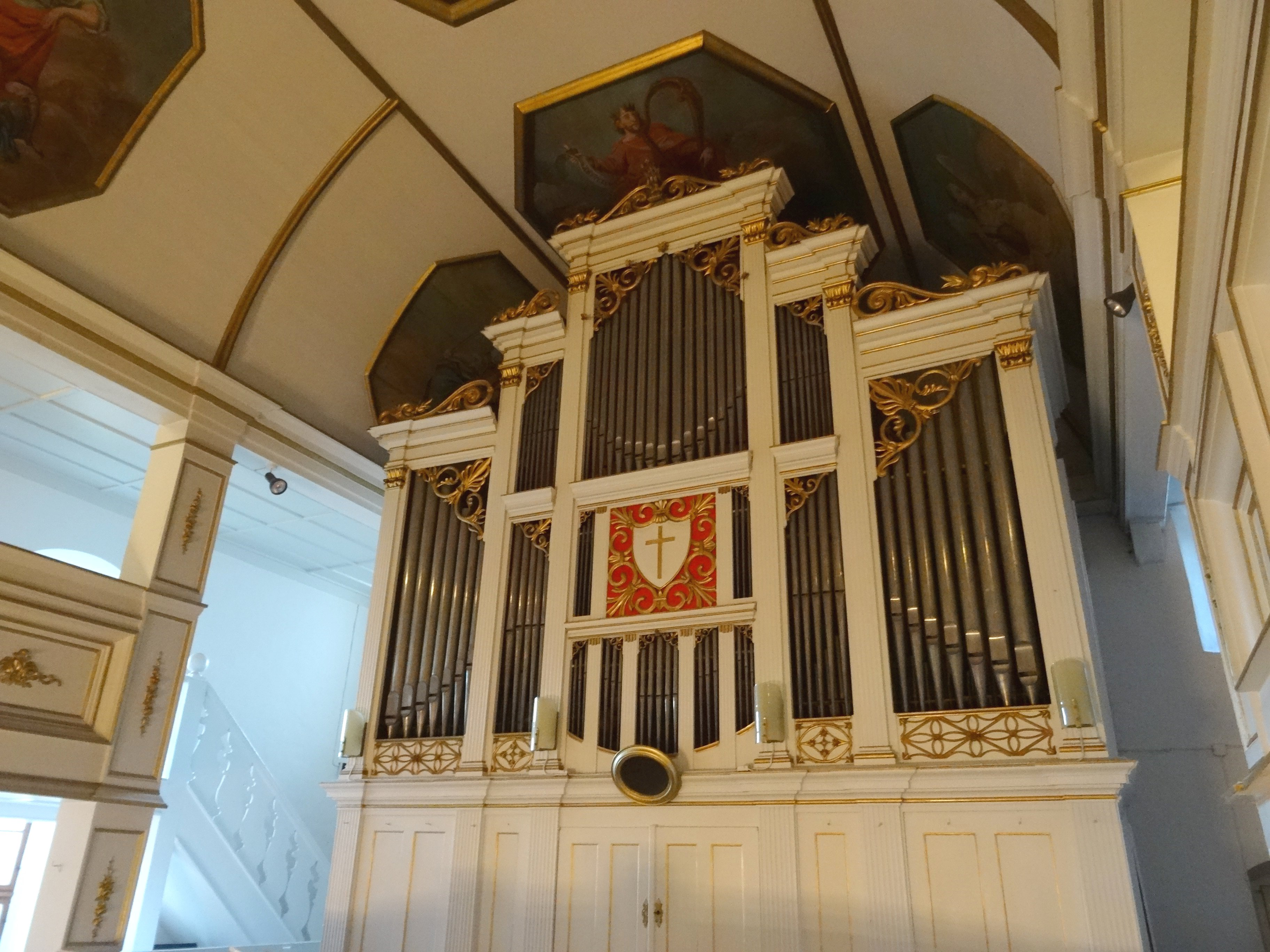 Die Orgel der St. Leonhardi Kirche wurde 1720 eingebaut, 1742 von Johann Christoph Thielemann ergänzt, 1839 von Johann Valentin Knauf erweitert und 1987 durch Norbert Sperschneider restauriert. 2011 wurde durch Orgelbau Waltershausen bei der Erneuerung des Blasebalgs die Ansaugung von extern auf intern geändert und damit der Feuchtigkeitseintrag verbessert.